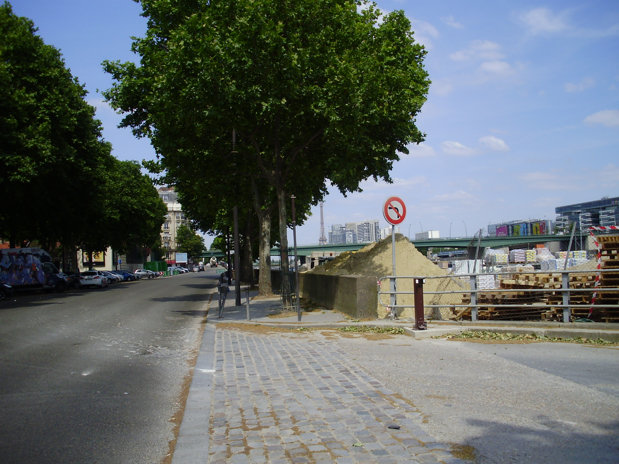 Quai Saint-Exupéry, Paris 16e arrondissement, France, à la sortie d'un dépôt de matériaux le long de la Seine.